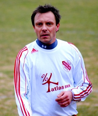 Ehemaliger Fußball-Profi und jetziger Trainer André Breitenreiter. Oberliga NDS-West 2009/10